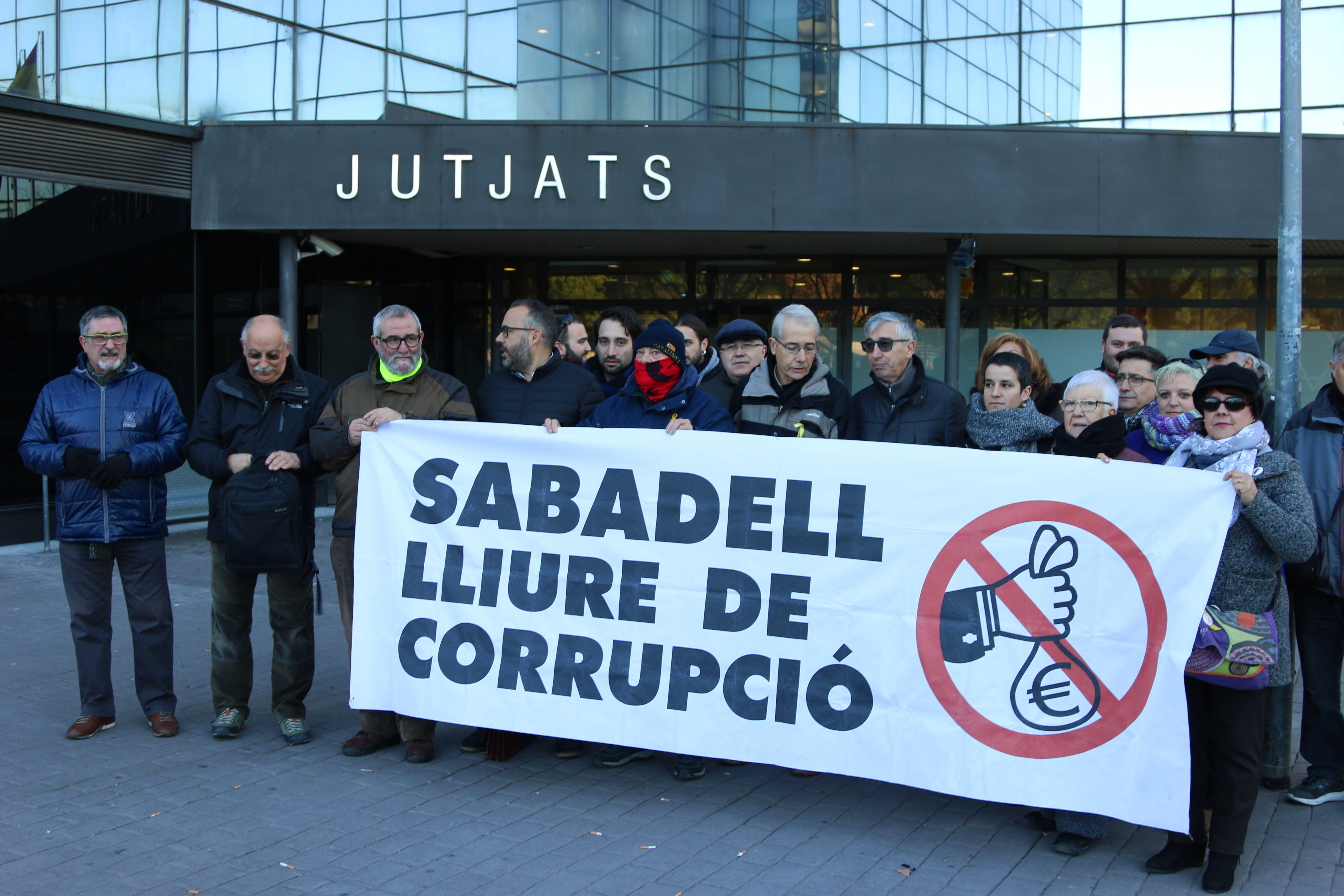 Concentració de la Plataforma Sabadell Lliure de Corrupció i la Plataforma STOP SMATSA als Jutjats de Sabadell el dia de la declaració d'Eugenio Angel Díaz (gerent d'SMATSA) i Marina Taltavull (cap de comunicació d'SMATSA) per la peça 28 del cas Mercuri.